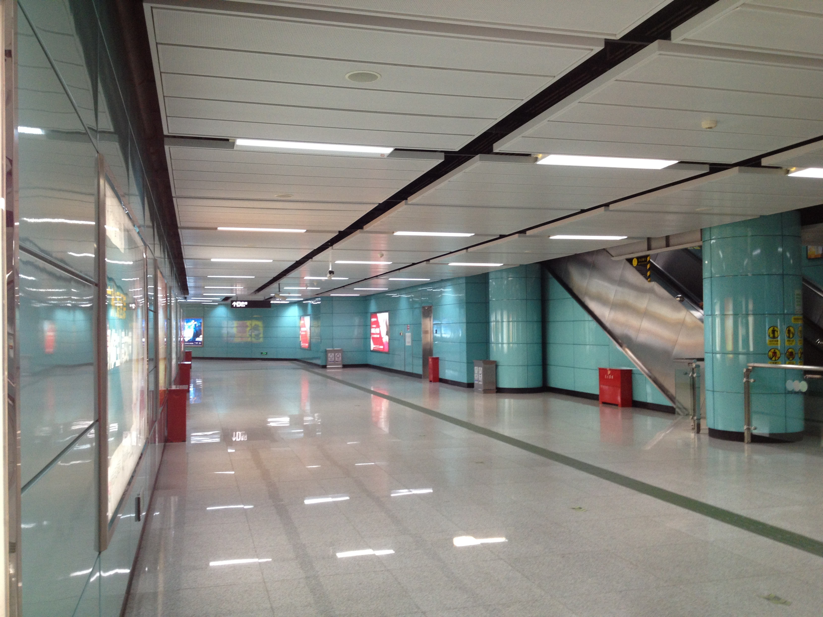 广州地铁西村站收费区站厅联络通道